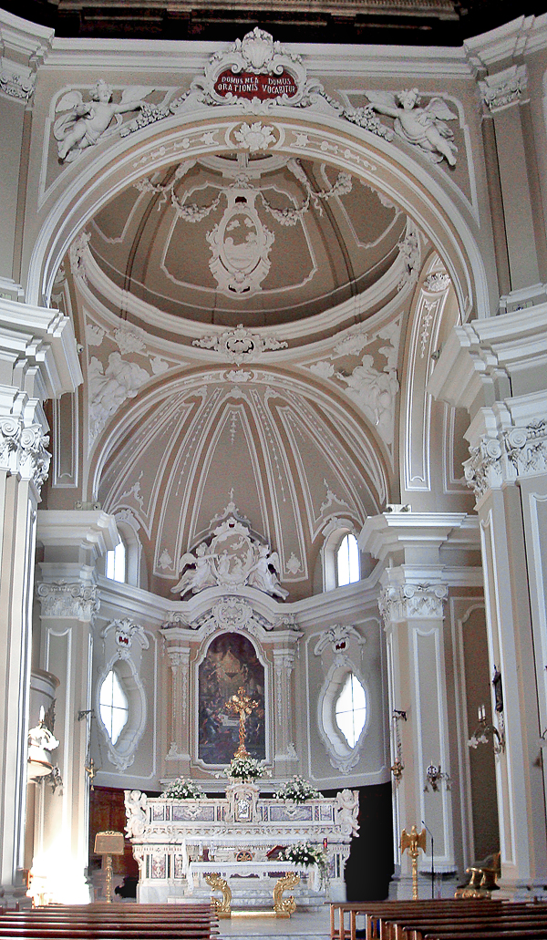 Particolare dell'interno di San Nicola a San Severo. Foto di Emanuele d'Angelo. Licensing Categoria:San Severo